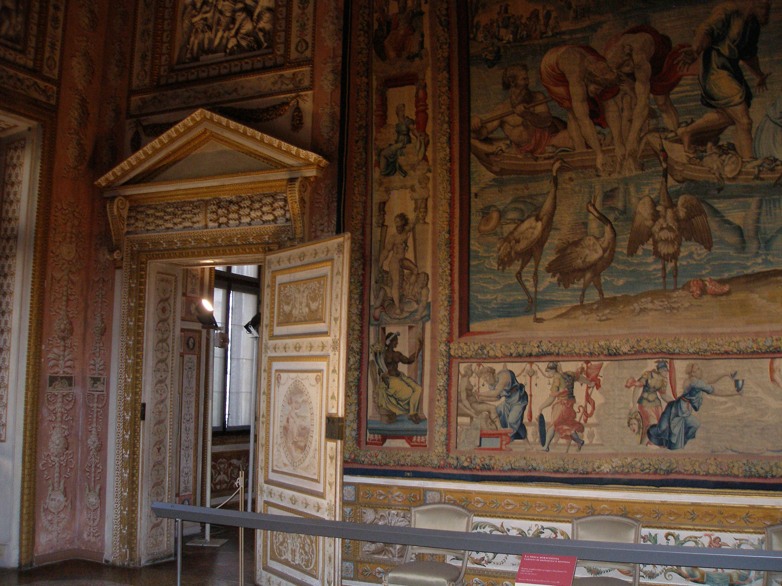 Mantua